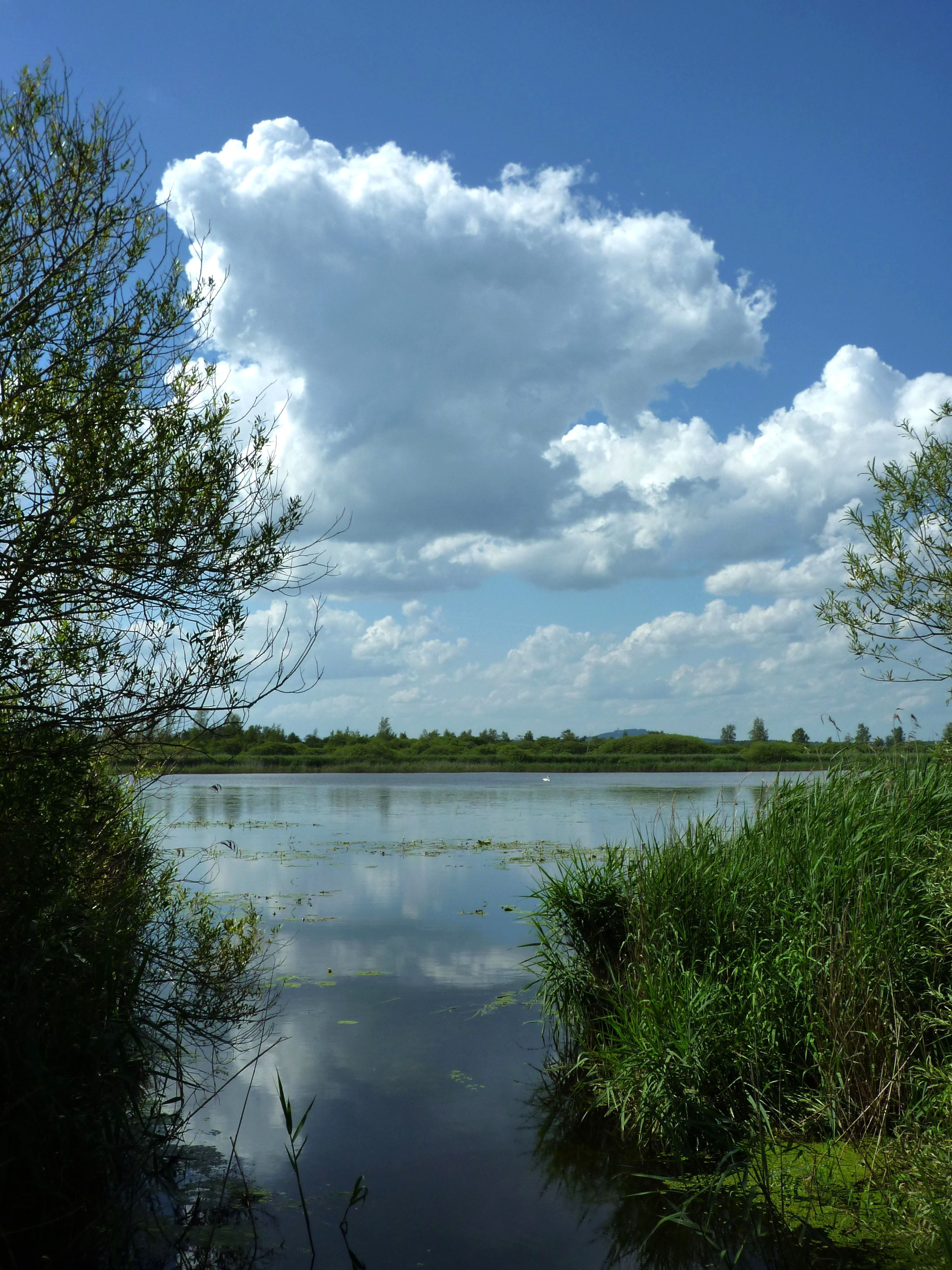 Bad Buchau - Wolken über dem Federsee